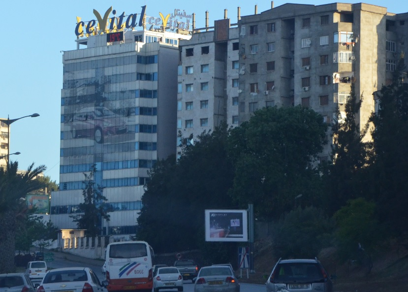 Siège social du groupe Cevital